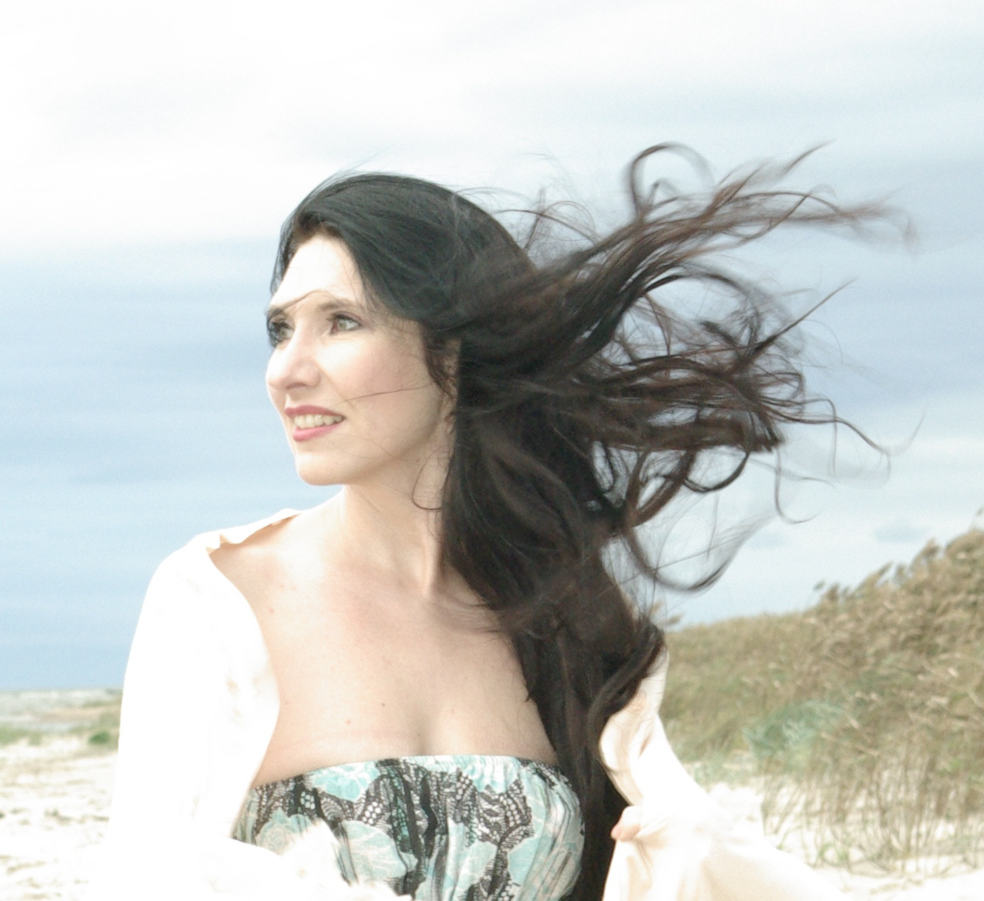 Täiskohaga naise fotosessioonil